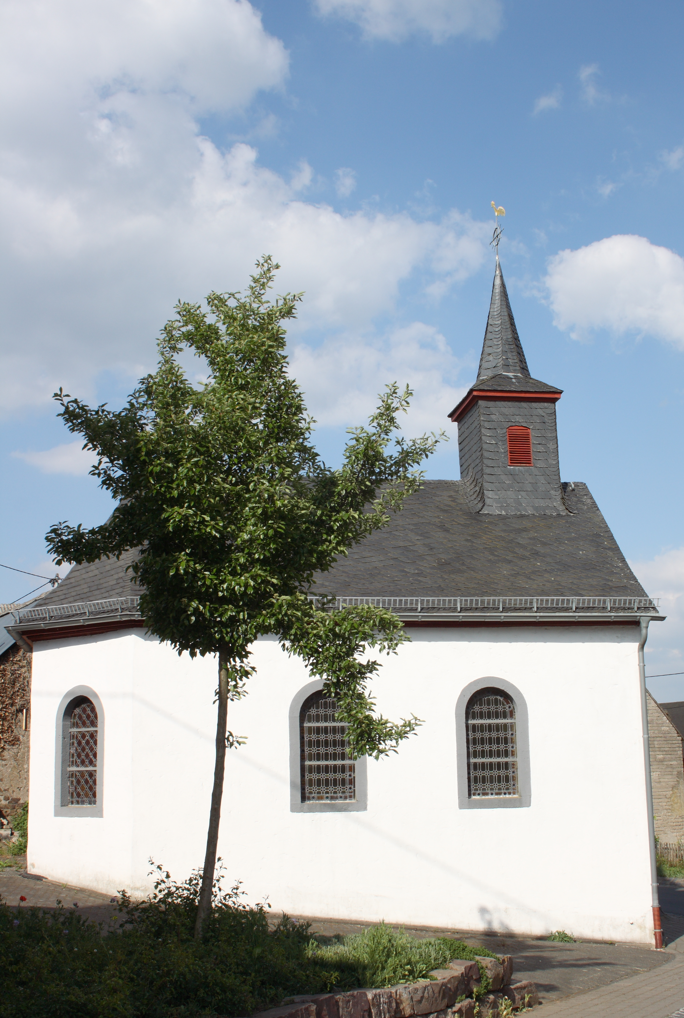 Katholische Filialkirche St. Wendelin in Sassen